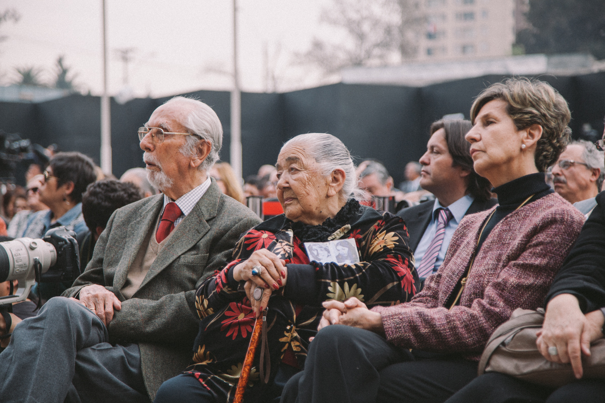 Andrés Aylwin, Ana González, María Isabel Allende.